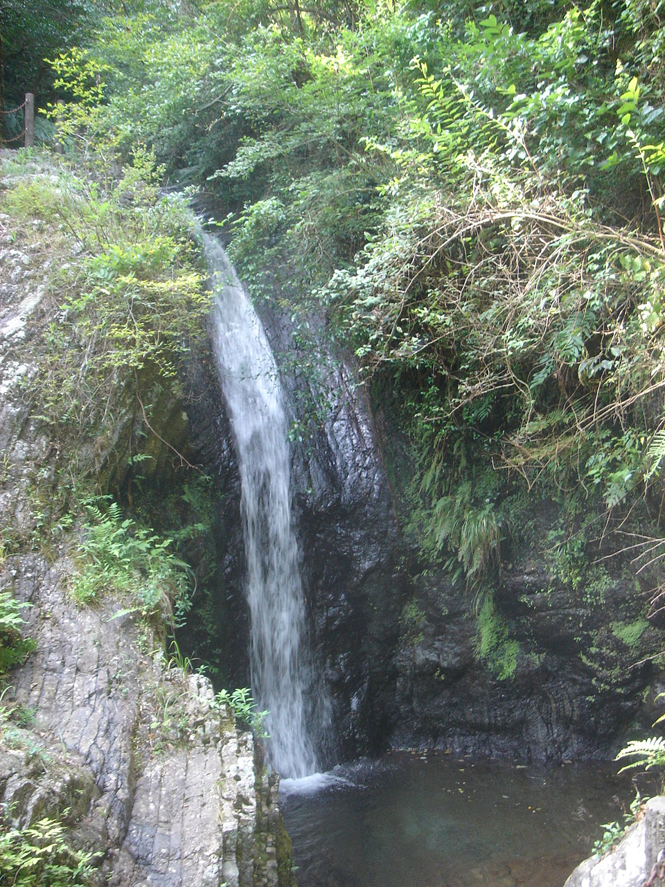 Hagi no Taki(Fall) in Gifu(萩の滝),Gifu,Gifu,Japan(岐阜県岐阜市)で撮影